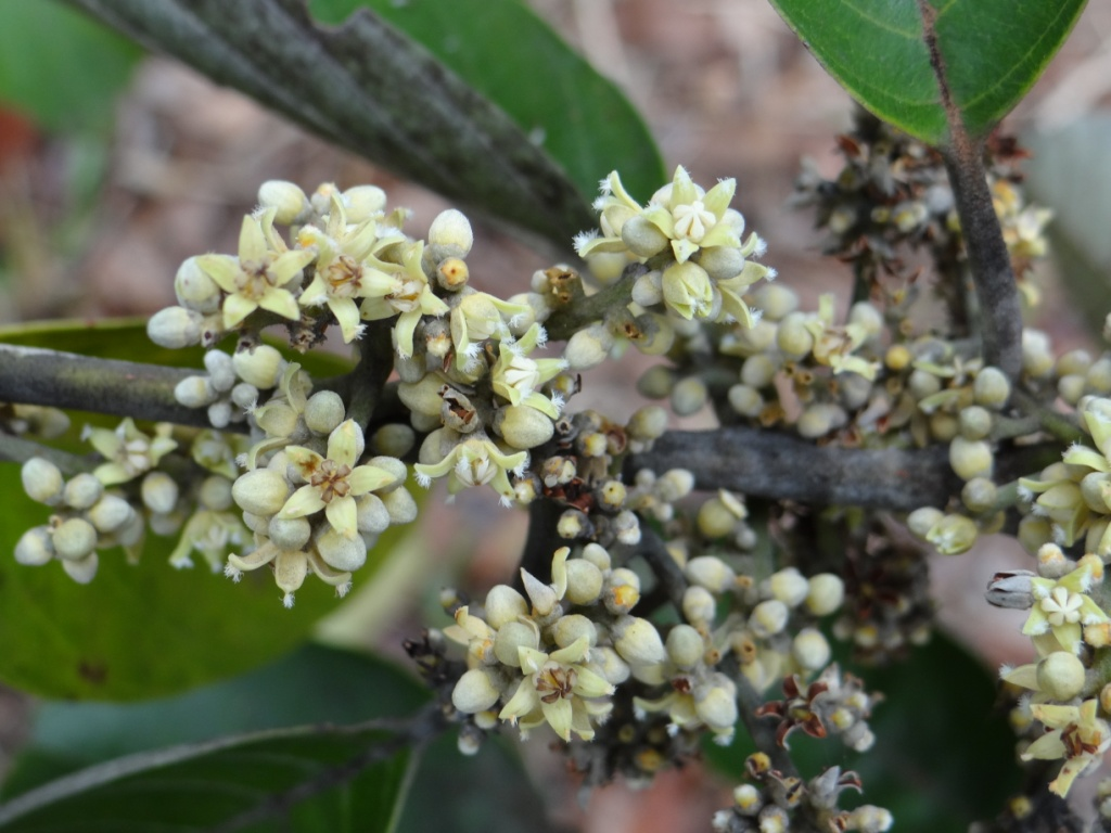 Emmotum nitens (Benth.) Miers - ICACINACEAE - Jardim Botânico de Brasília - Brasília - Distrito Federal - Brasil.